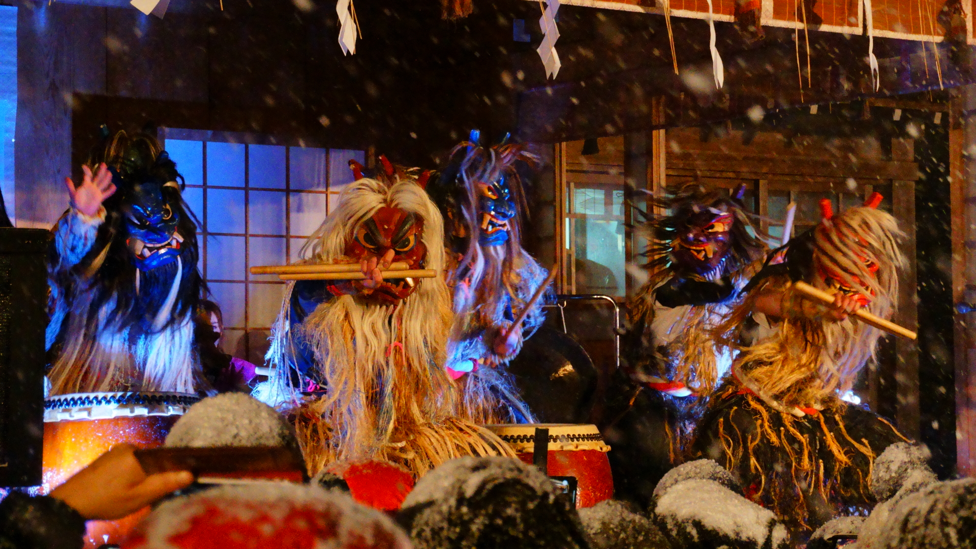 なまはげ柴灯まつりにて行われるライブパフォーマンス「なまはげ太鼓」 This photo has been taken in the country: Japan